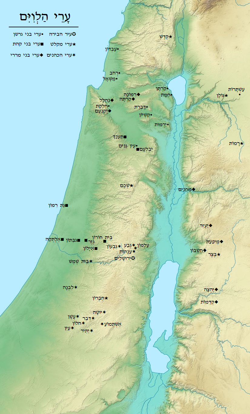 מפת ערי הלויים בארץ ישראל בתקופת המקרא. המיפוי נעשה בסיוע אטלס כרטא לתקופת המקרא